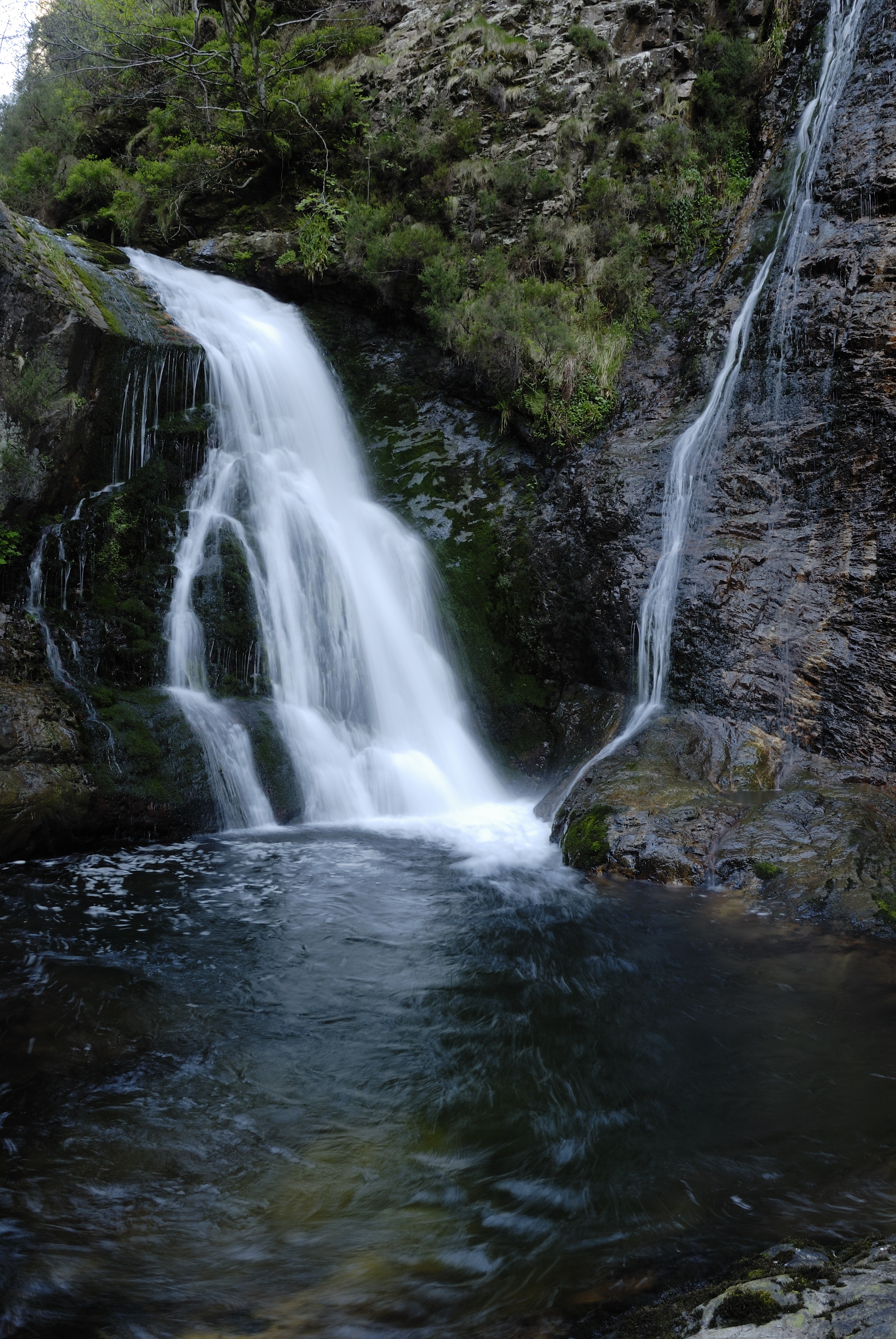 Cascada